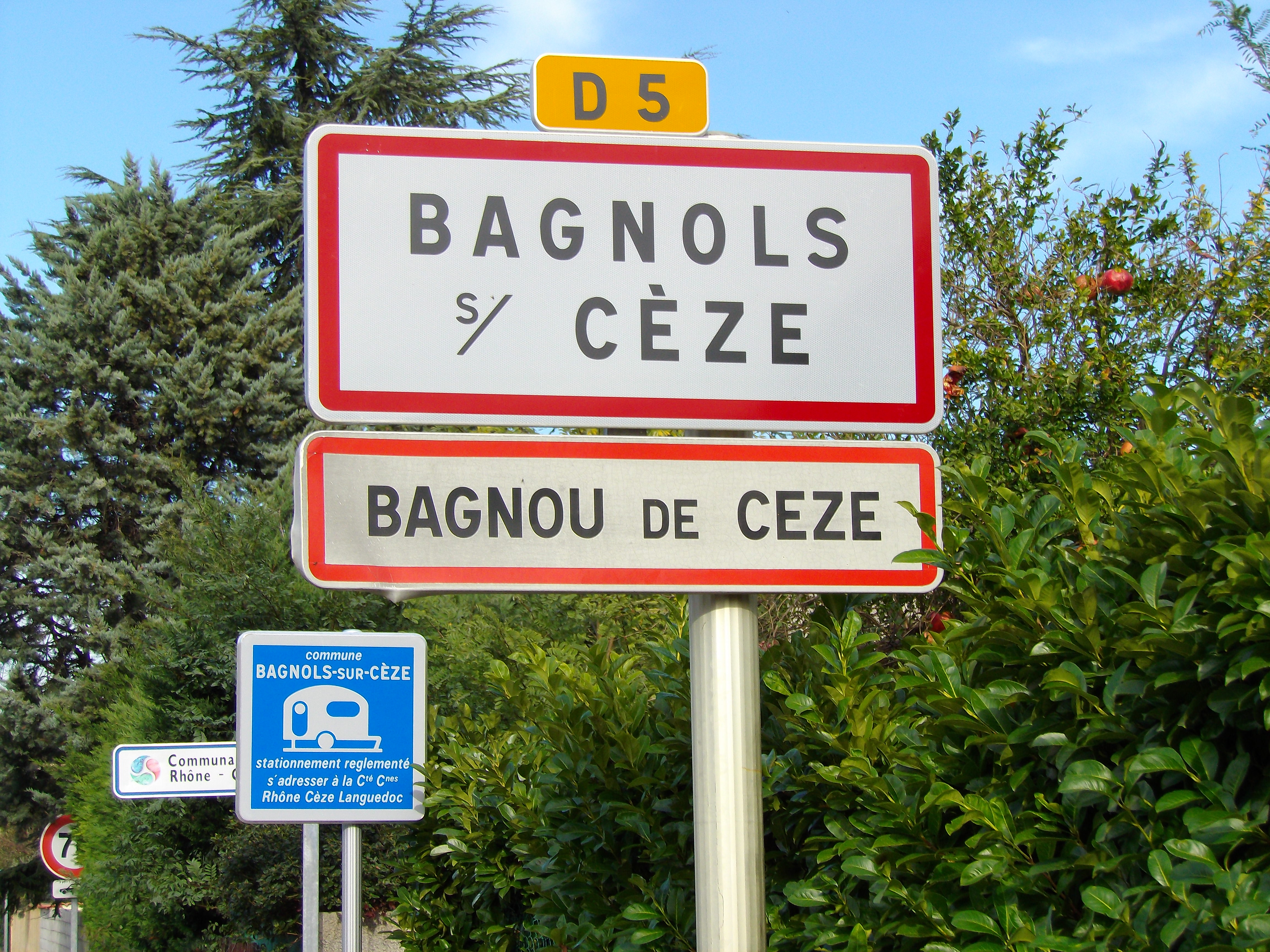 Signalisation bilingue français/provençal à l'entrée de Bagnols-sur-Cèze (Gard, France).